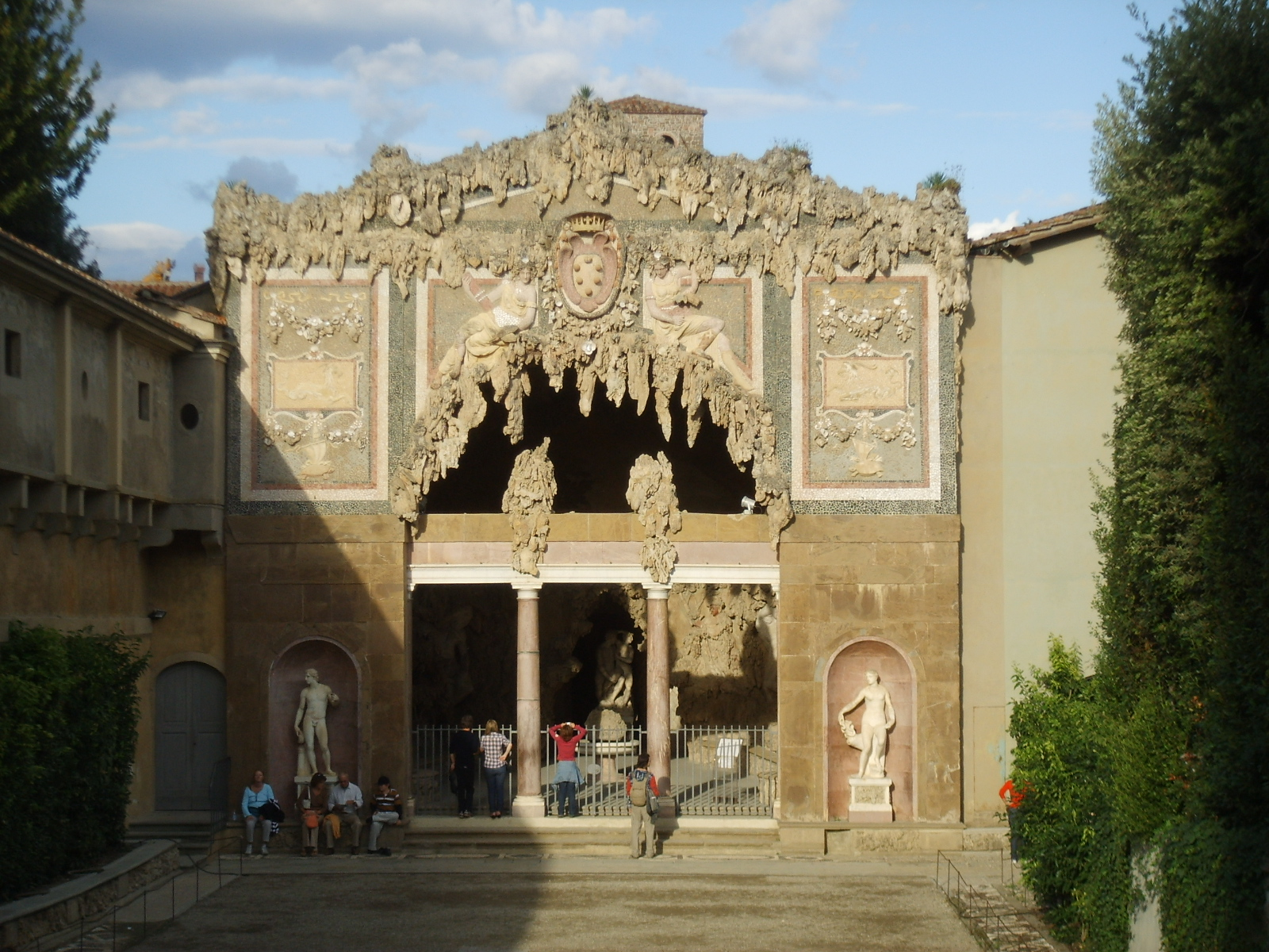 Grotta del buontalenti